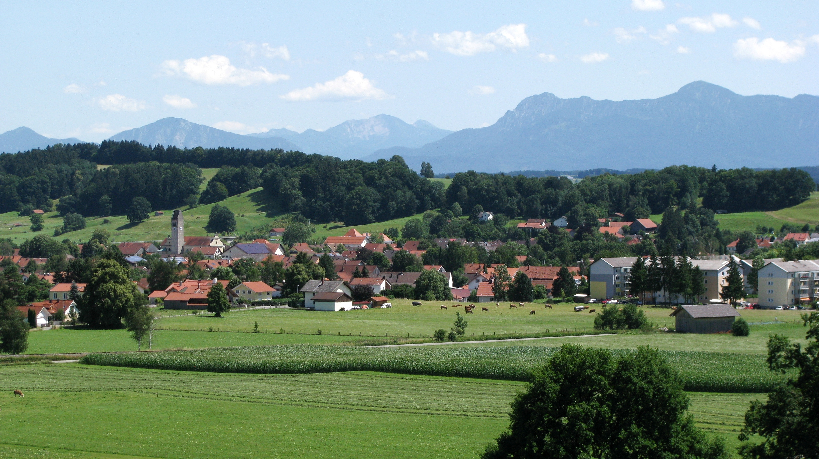 Peißenberg aus nordwestlicher Richtung.